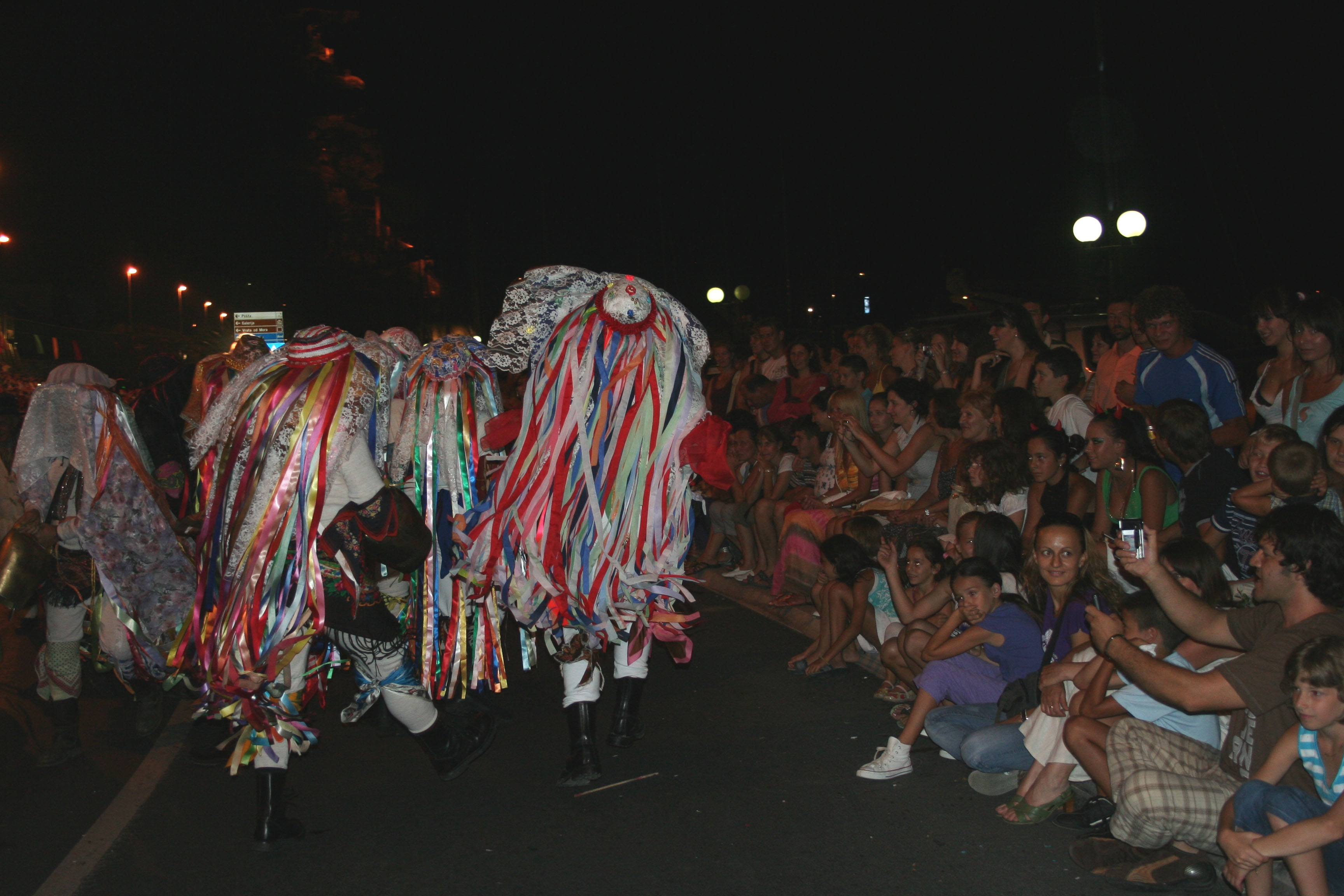 Scatto effettuato nel corso della manifestazione internazionale di Kotor Cattaro, città UNESCO del Montenegro.